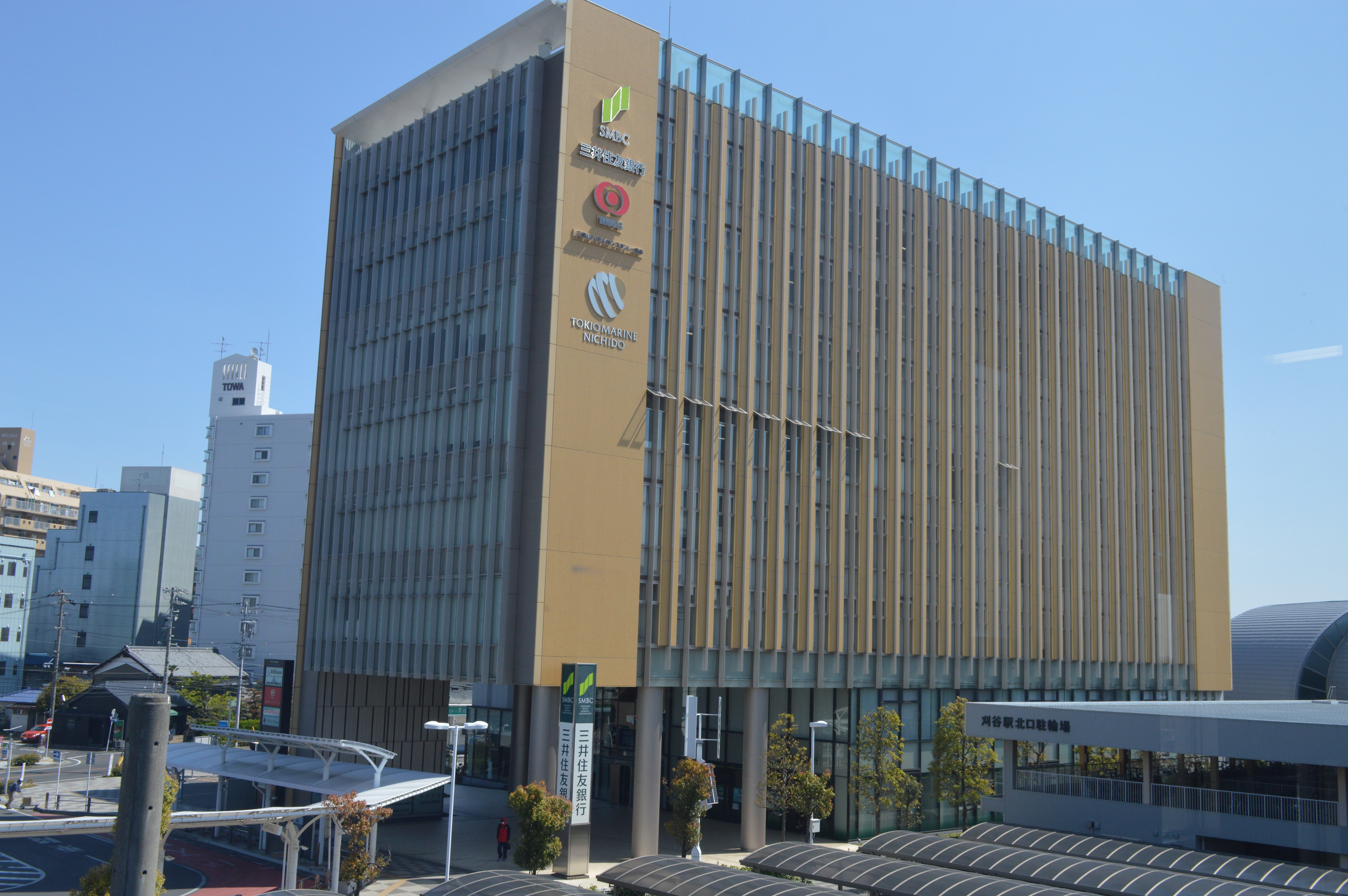 愛知県刈谷市相生町1丁目1-1にあるアドバンス・スクエア刈谷。